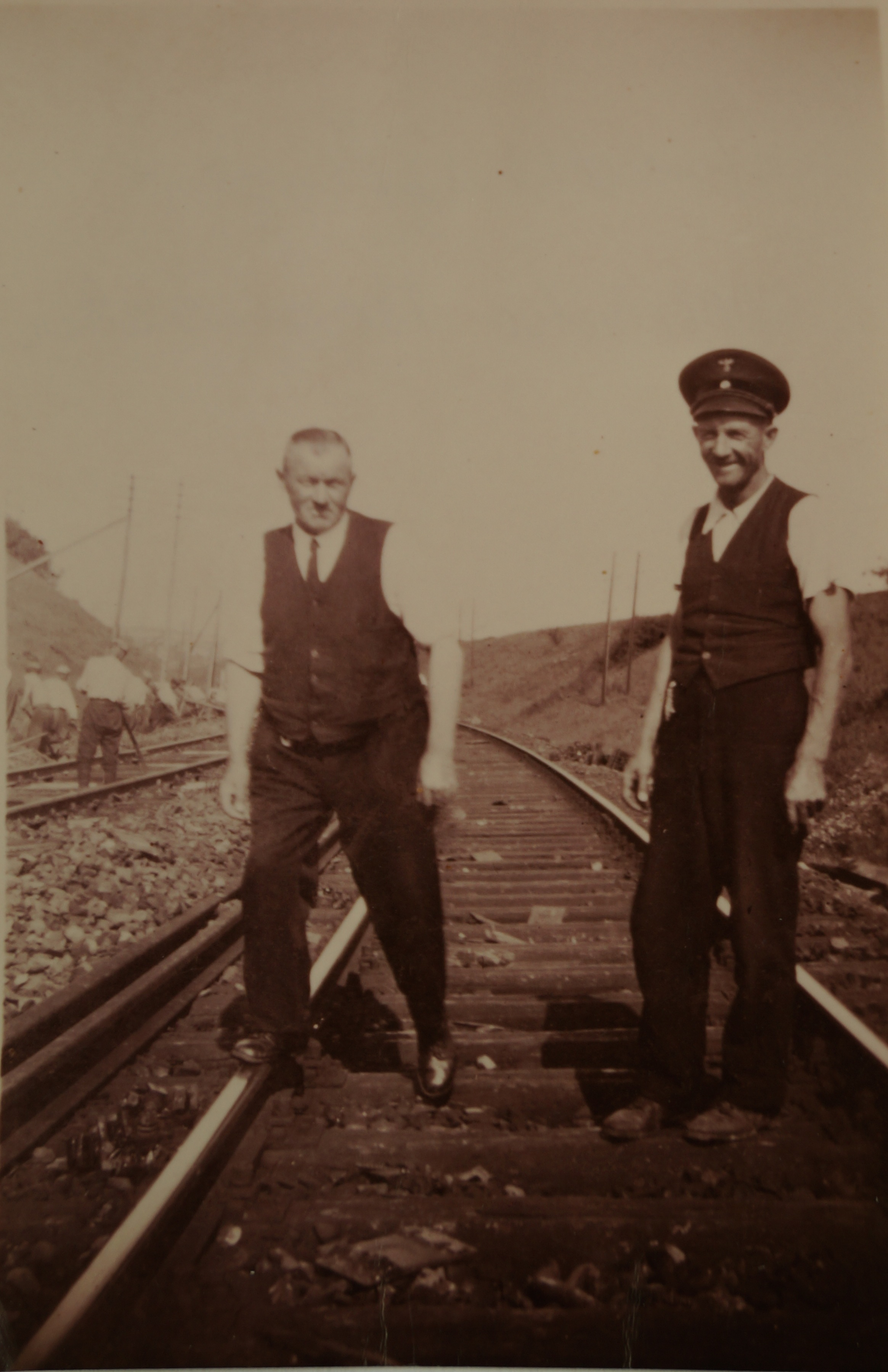 Streckenläufer der Deutschen Reichsbahn, um 1950